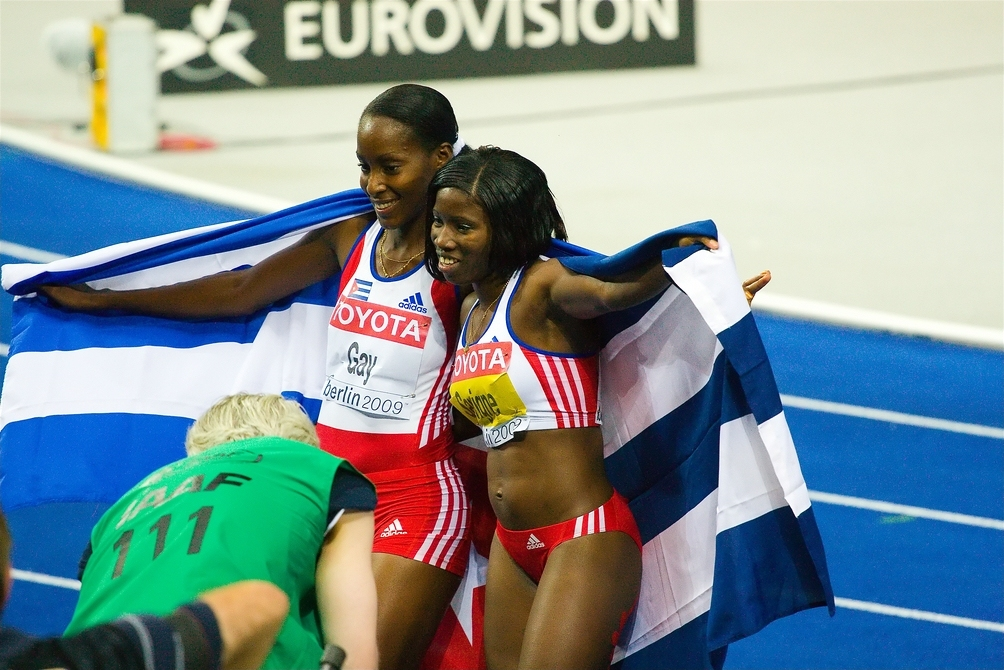 Yargelis Savigne und Mabel Gay - Weltmeisterin und Zweite im Dreisprung - während der Leichtathletik-WM 2009 in Berlin.